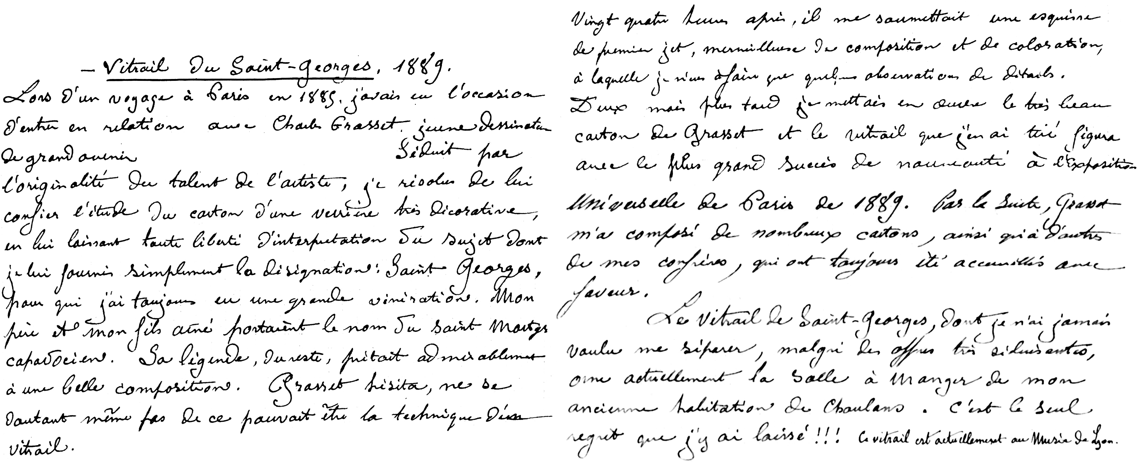 Mémoires manuscrites de Lucien Bégule sur Eugène Grasset